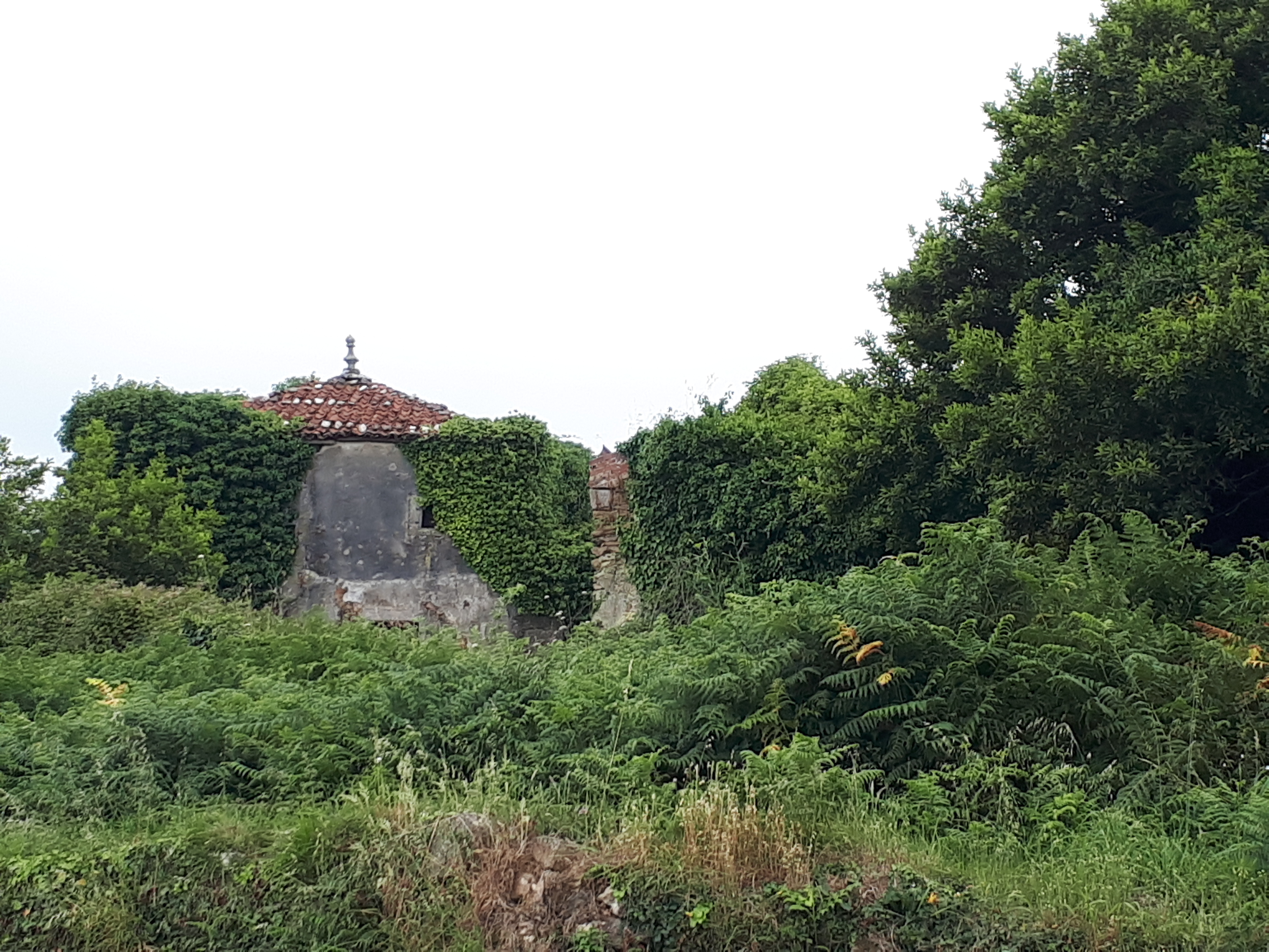 Pazo das Torres de Tallo, 2019